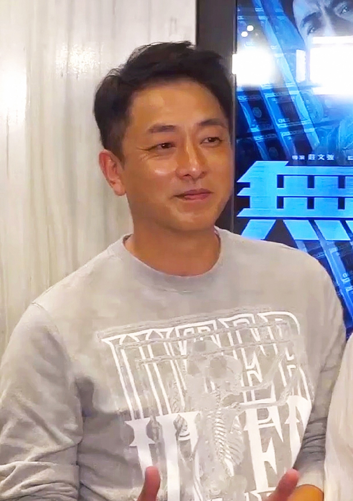 中文（香港）: 銅鑼灣時代廣場 UA Cine Times 戲院《無雙》謝票活動